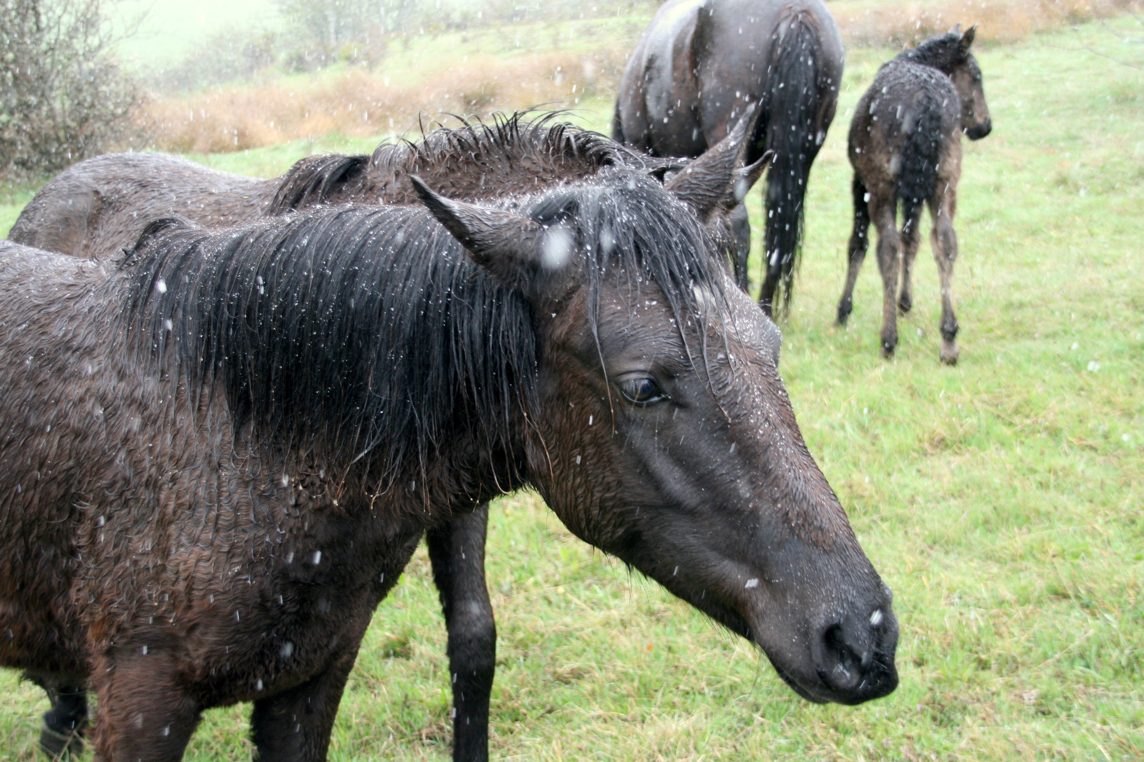 Caballos losinos en Bison Bosanus, Reserva y Centro de Interpretación del Bisonte Europeo de San Cebrián de Mudá (Palencia) This is a photography of a Special Area of Conservation in Spain with the ID: ES4140011. Natura2000 entry, EEA entry